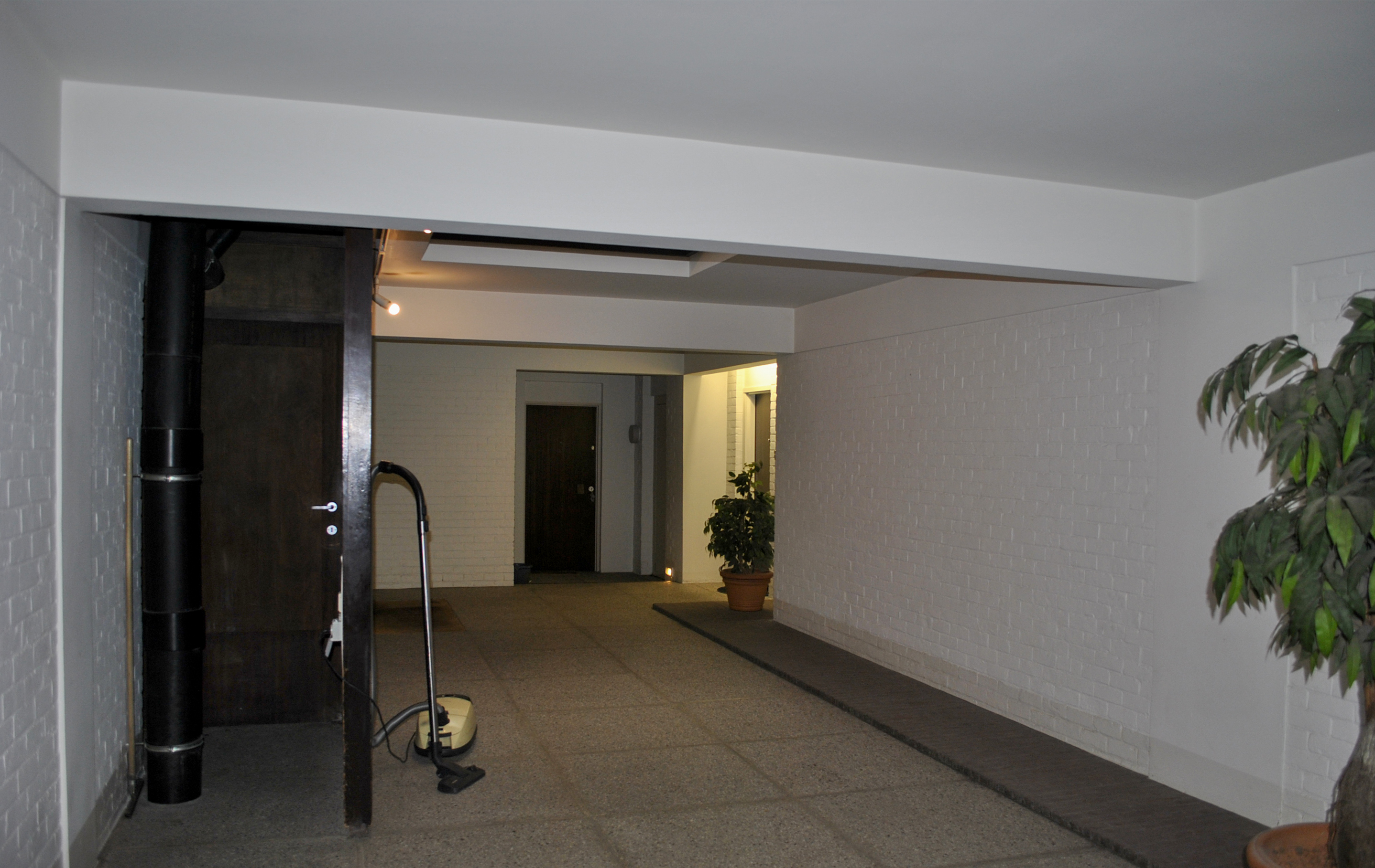 Vue sur le Hall d'entrée